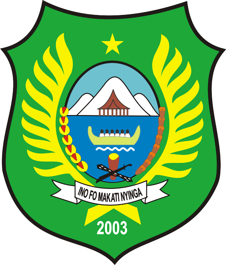 Lambang Kabupaten Halmahera Barat